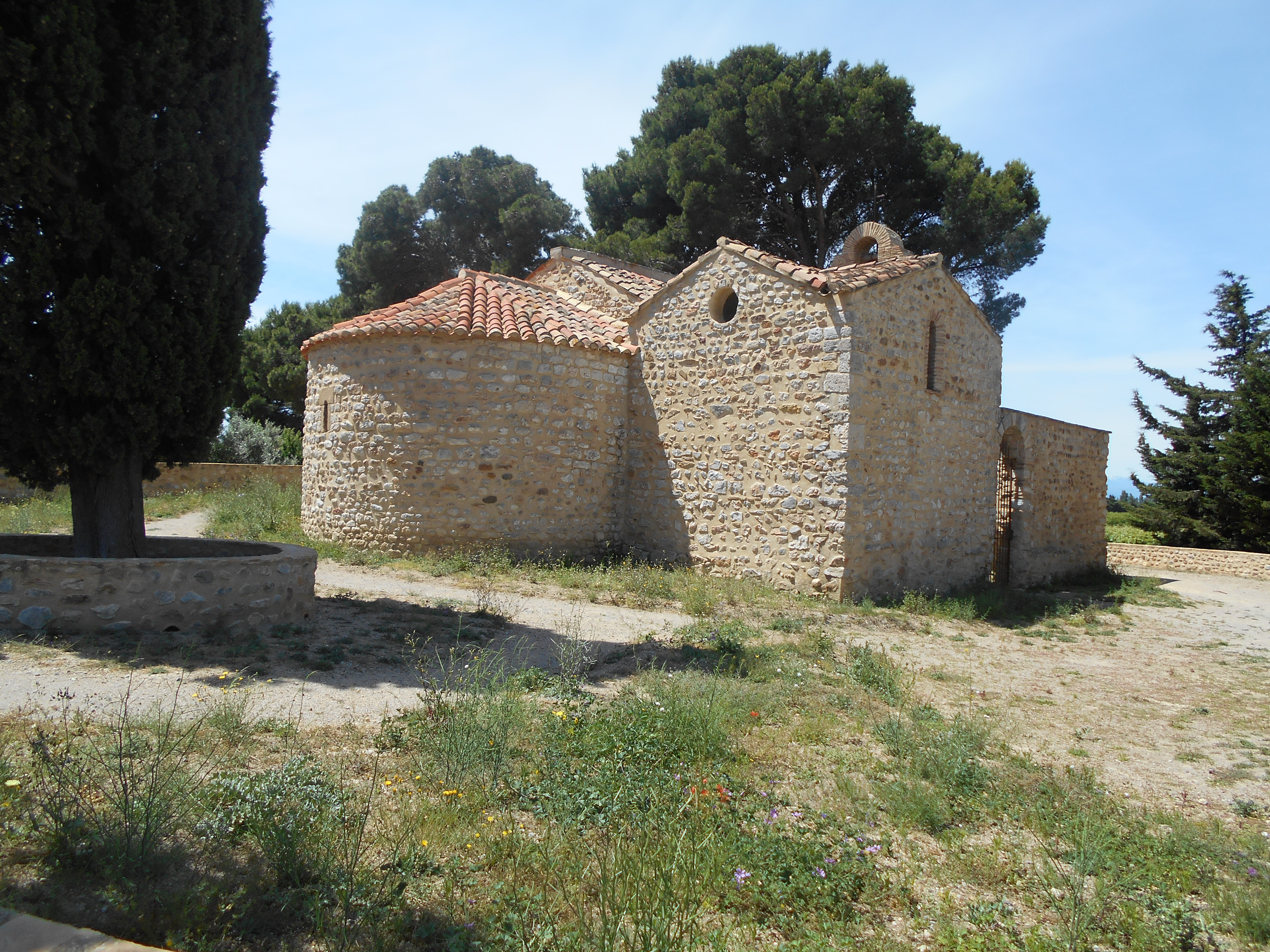 Santa Cecília de Garrius vista des del nord-est